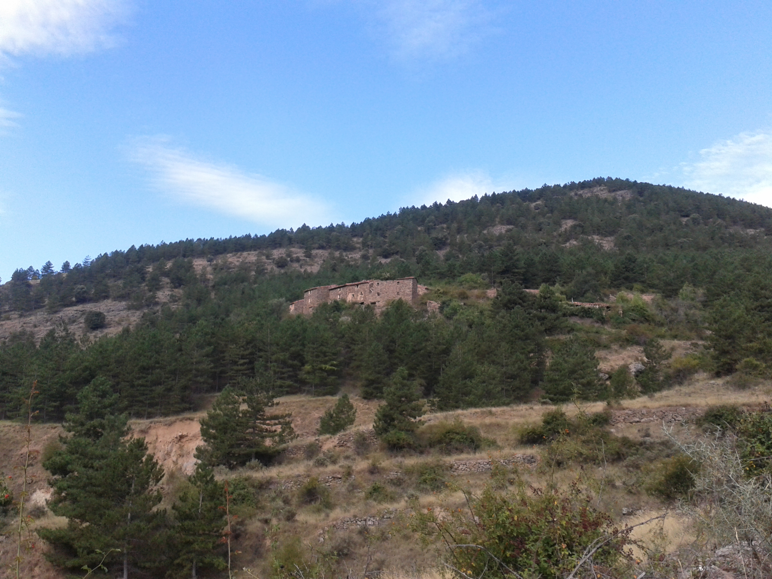 Vista del pueblo soriano de Peñazcurna desde un camino que dirige a dicho pueblo.